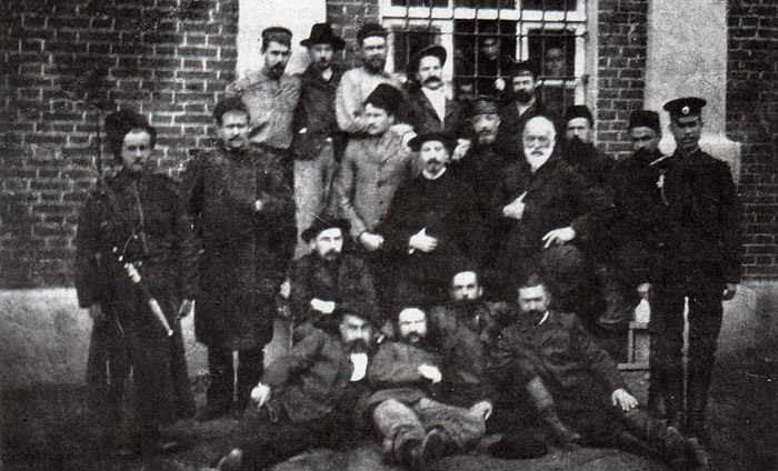 В результате вооруженного восстания в 1905-1906 гг в Сочи в течение краткого периода была Сочинская республика. На снимке участники вооруженного восстания у здания тюрьмы, Сочи,1906 год